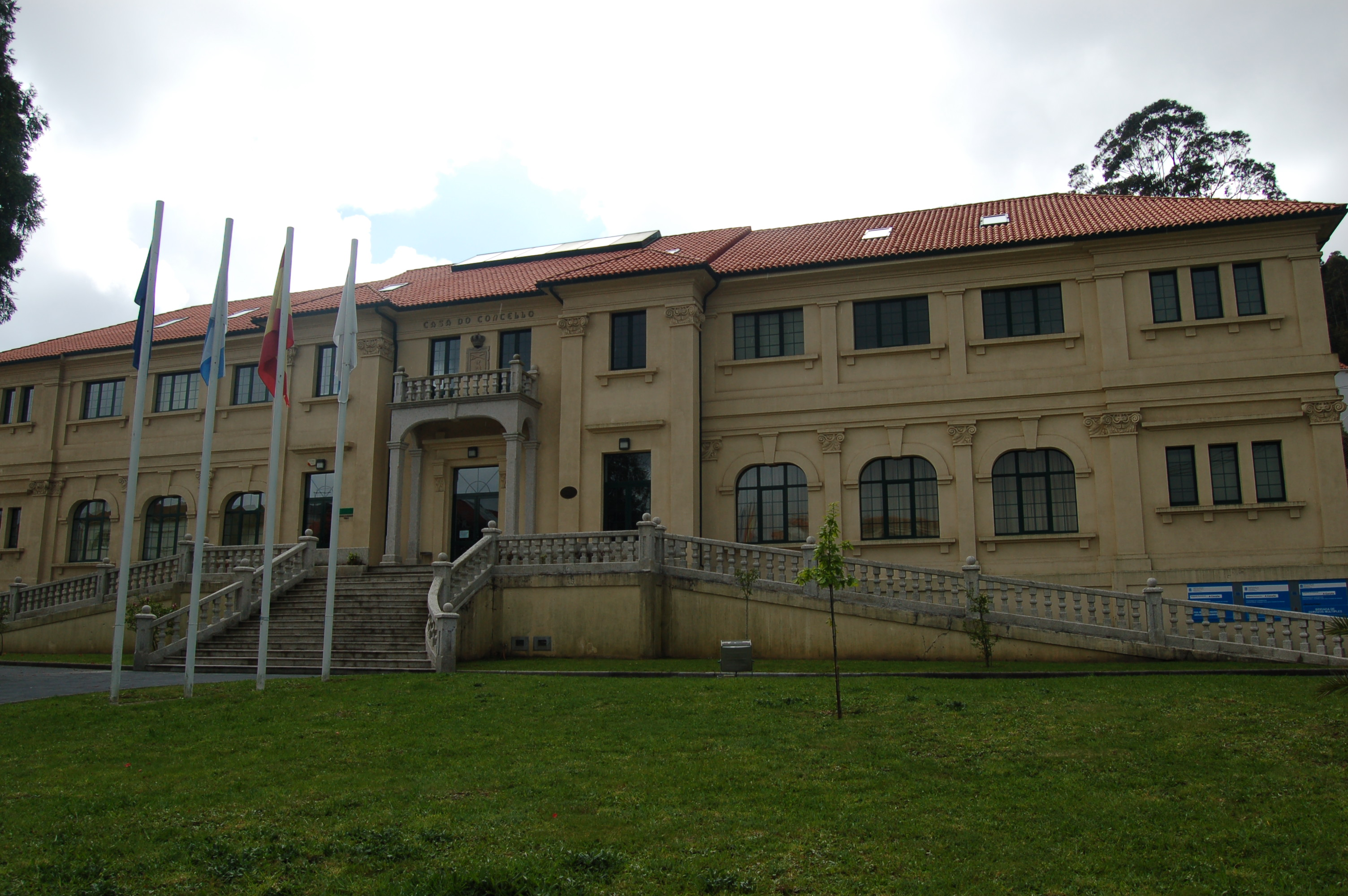 casa consistorial de Corcubión